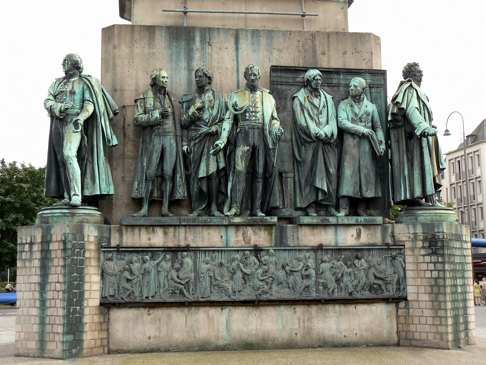 Sieben der 16 Sockelfiguren am Reiterstandbild für den preußischen König Friedrich Wilhelm III. (1878) von Gustav Blaeser auf den Heumarkt in Köln.